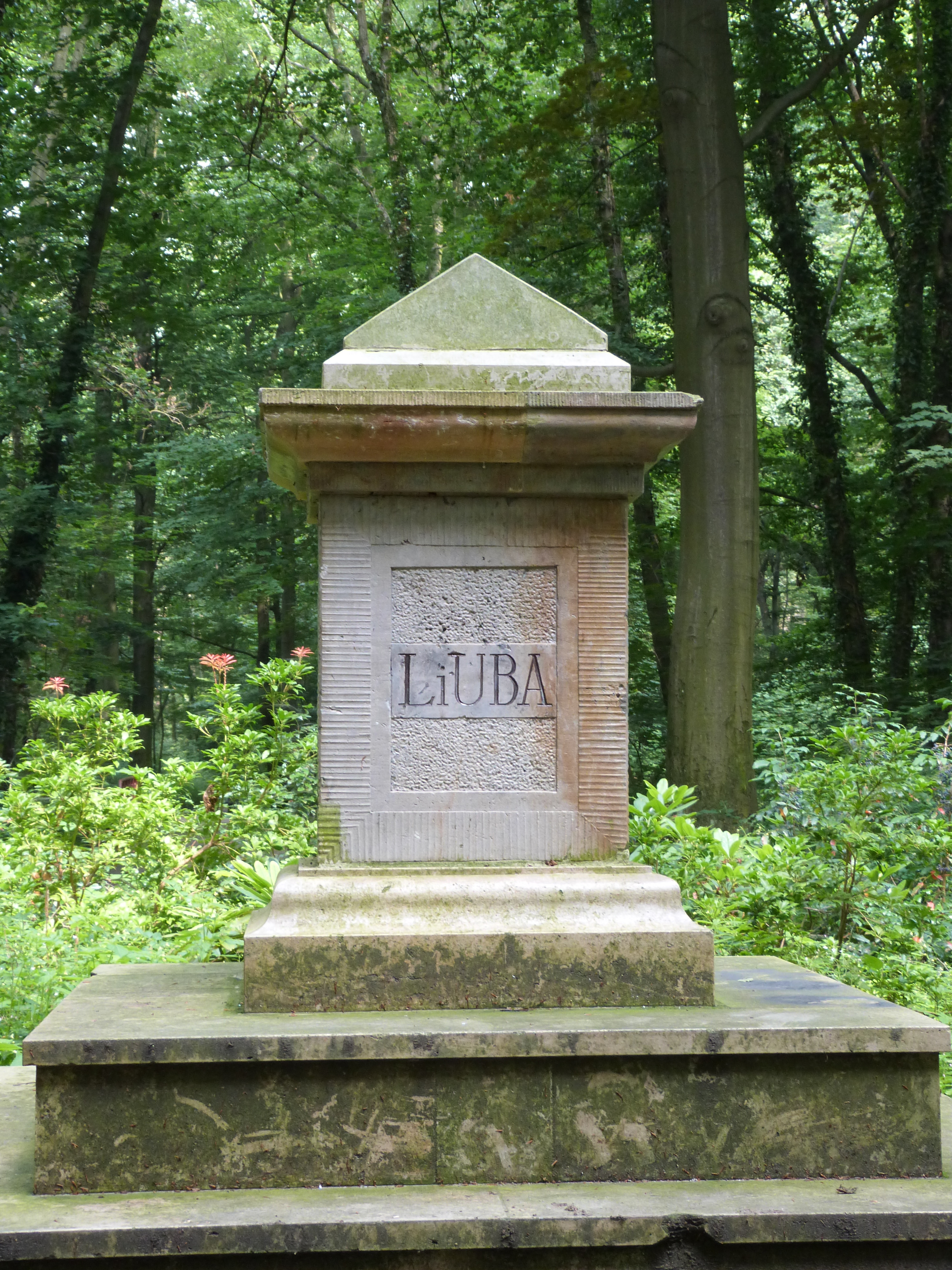 Gedenkstein der Liuba im Lübbenr Stadthain. Dieser Gedenkstein benennt die wendische (sorbisch-slawische) Göttin der Liebe und des Frühlings, Liuba. Der Stein wurde im Stadthain der Stadt Lübben am Ort einer ehemaligen wendischen Kultstätte der Eiche Lubans errichtet.